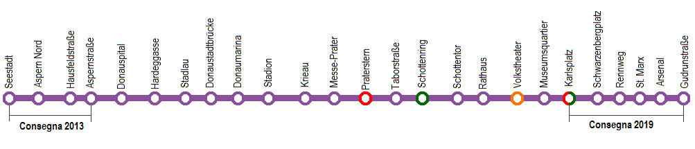 Linea U2 metro vienna